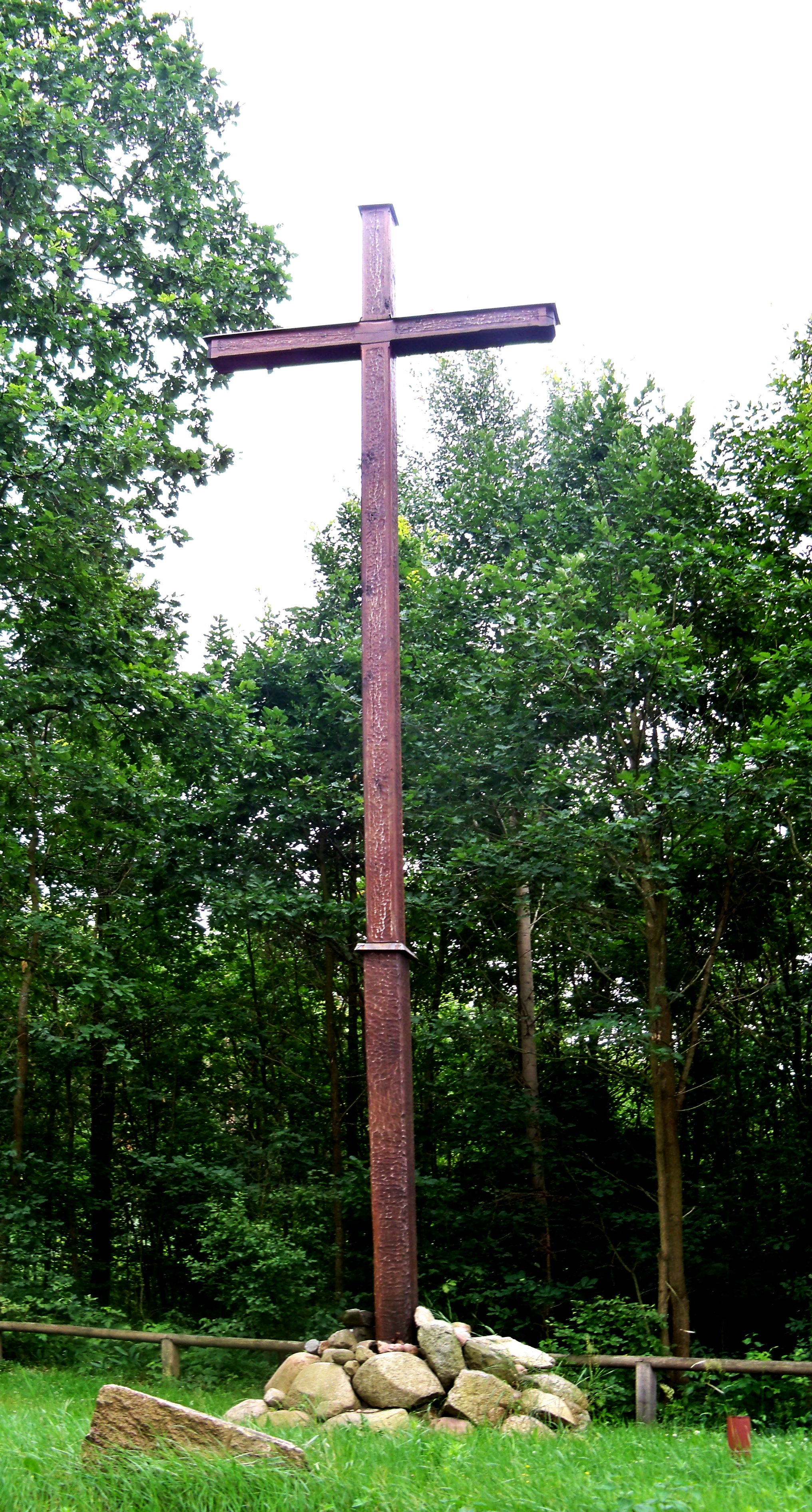 Krzyż pod Augustowem (Puszcza Kozienicka) upamiętniający walki 31 Pułku Strzelców Kaniowskich 17-18.09.1939